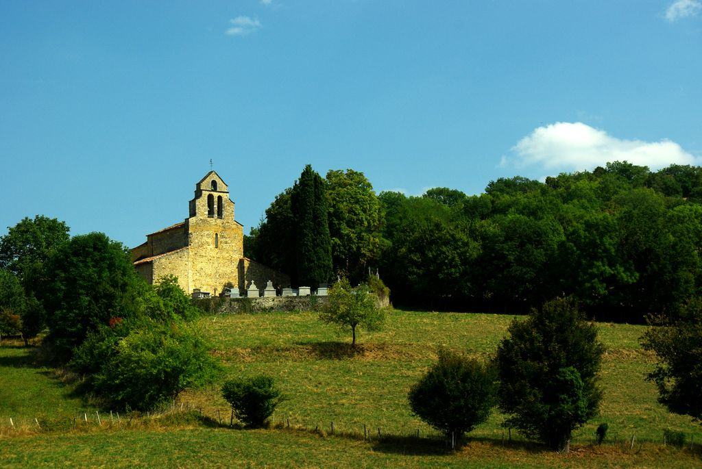 Église Saint-Pierre (XIIe s.). Montgauch est un village du Couserans proche de Saint-Girons. Située hors du village, son église romane est juchée sur une colline. .